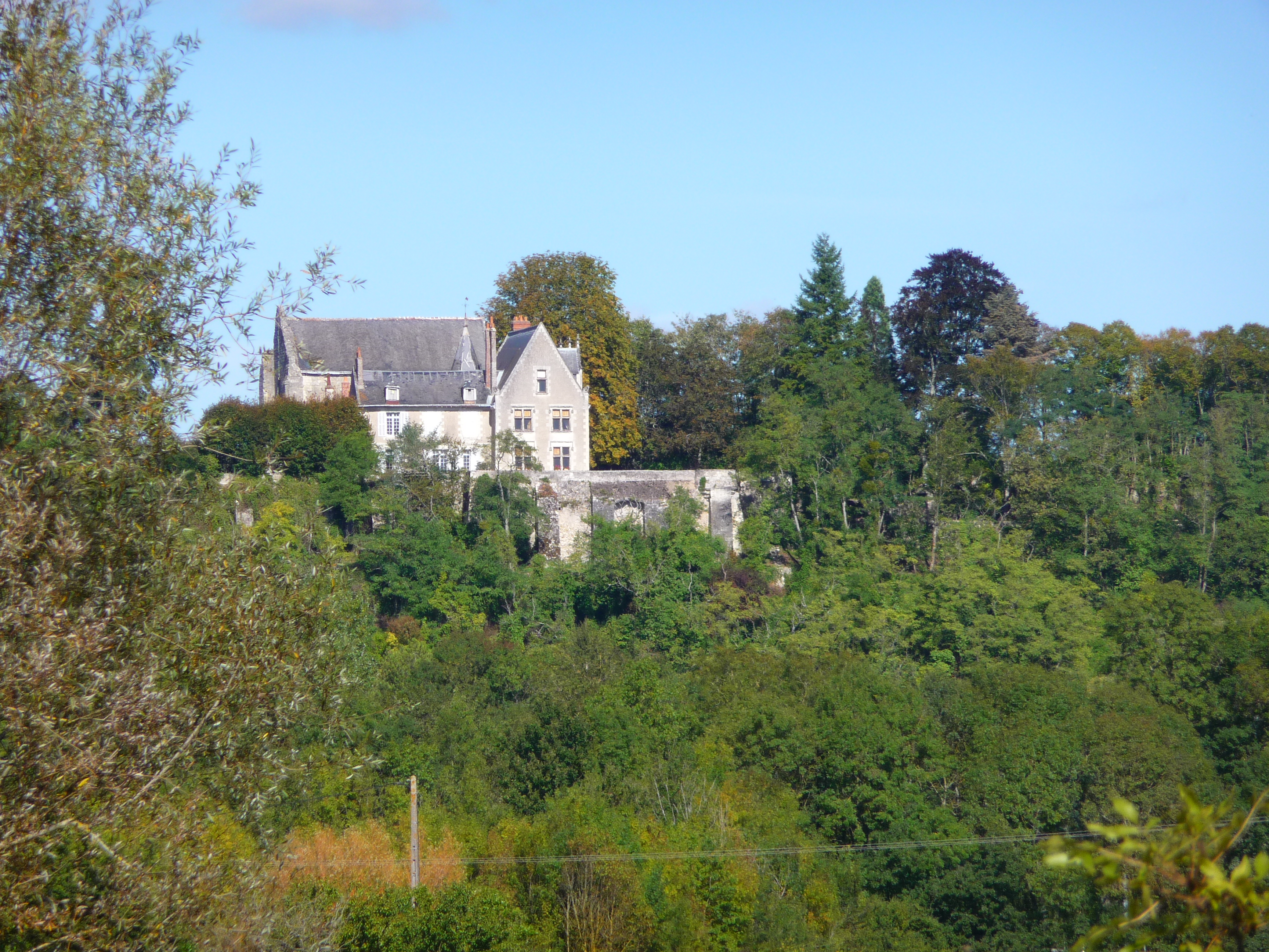 Prieuré de Saintè-Venant Vue du Sud